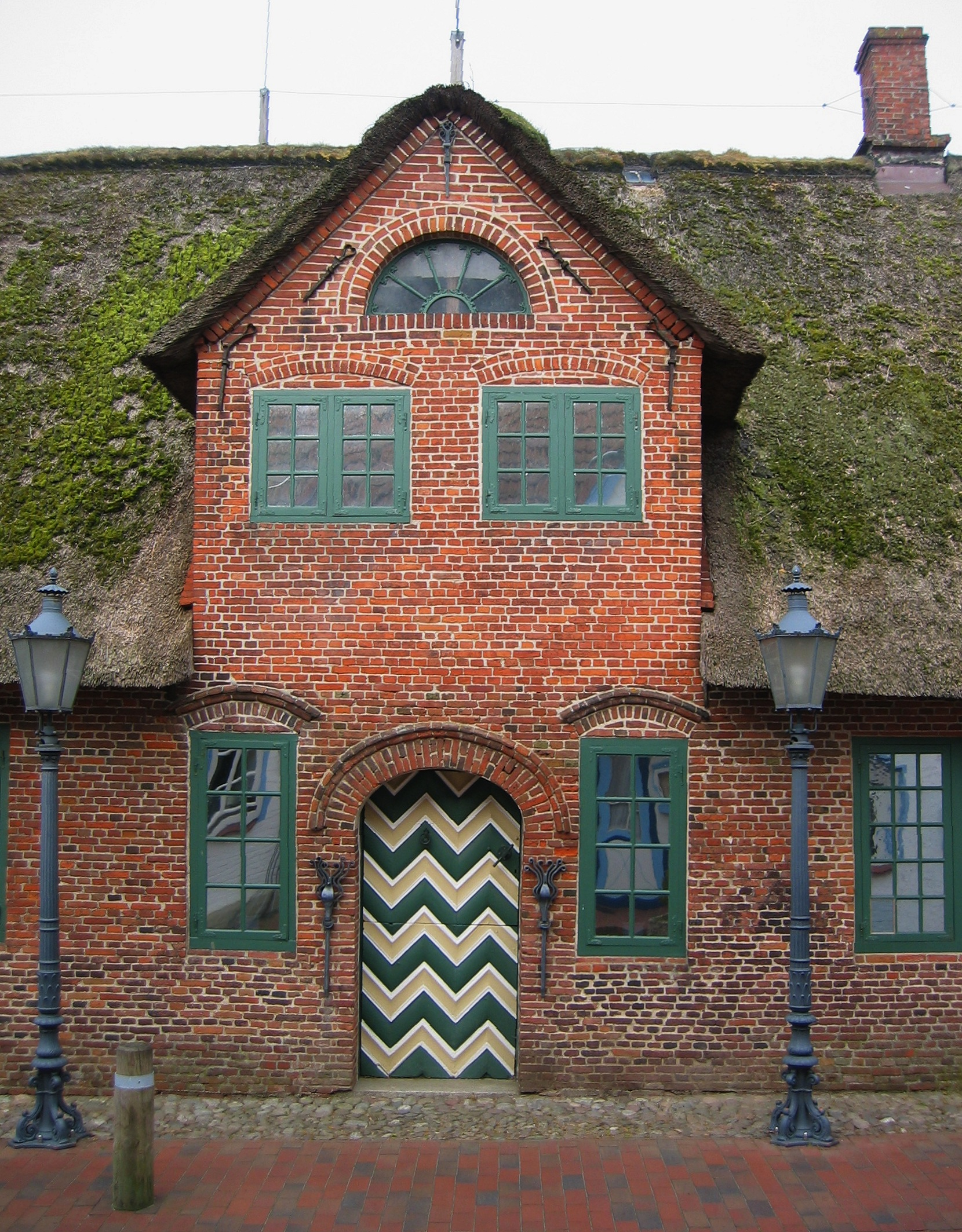 Eingang des Heimatmuseums in Sankt Peter-Ording, Dorf.